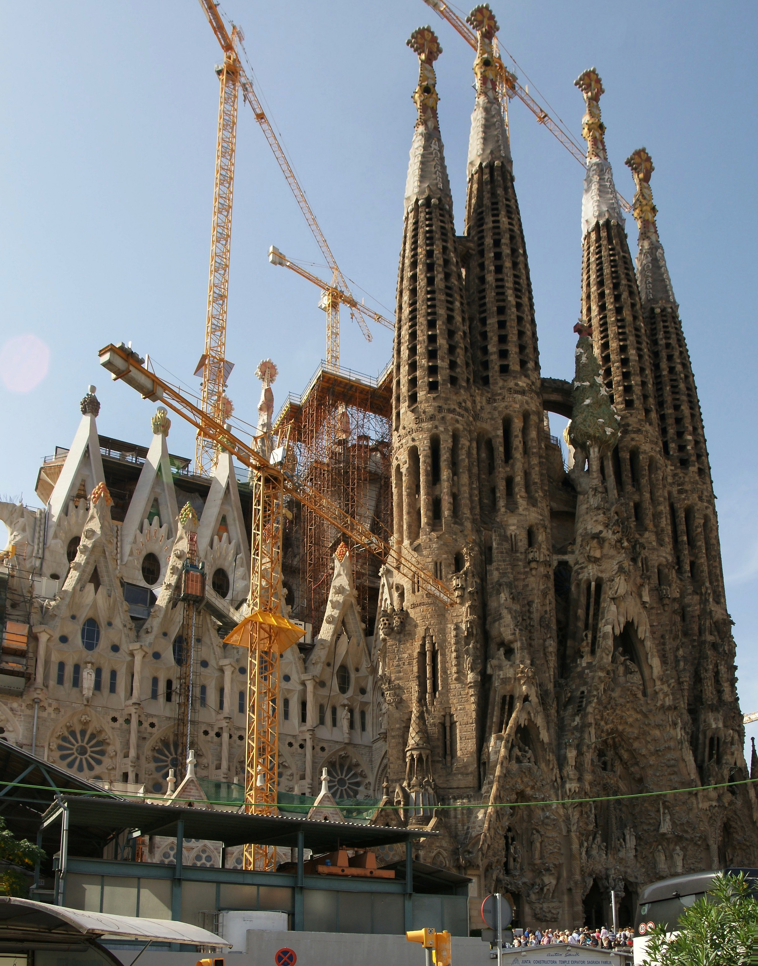 Temple Expiatori de la Sagrada Família (dt.: Sühnekirche der Heiligen Familie) (oft nur Sagrada Família genannt) ist die Bezeichnung einer großen römisch-katholischen Basilika in Barcelona. Die ursprünglich im neukatalanischen Stil, von Antoni Gaudí entworfene Kirche wurde 1882 begonnen, jedoch bis heute nicht vollendet. Der höchste Punkt (das Kreuz) sollte bei 170m liegen.